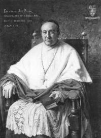 Edouard Belin (1831-1892)- bisschop van Namen (1884-1892)- Namen - Provincie Namen - België